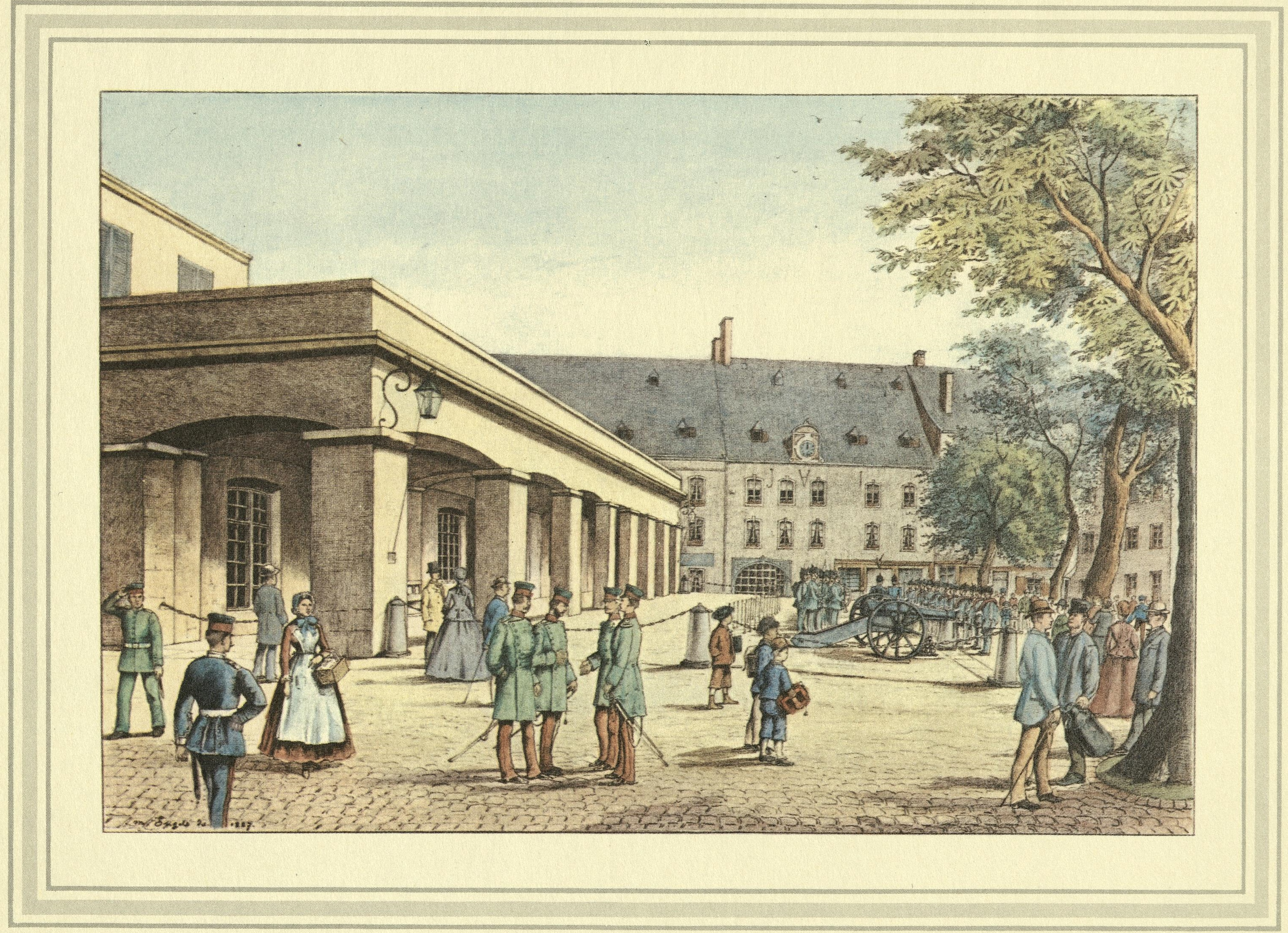 Dessin pittoresque de la forteresse de la Confédération germanique (Bundesfestung) Luxembourg par Michel Engels (1851-1901): XX - Le corps de garde principal